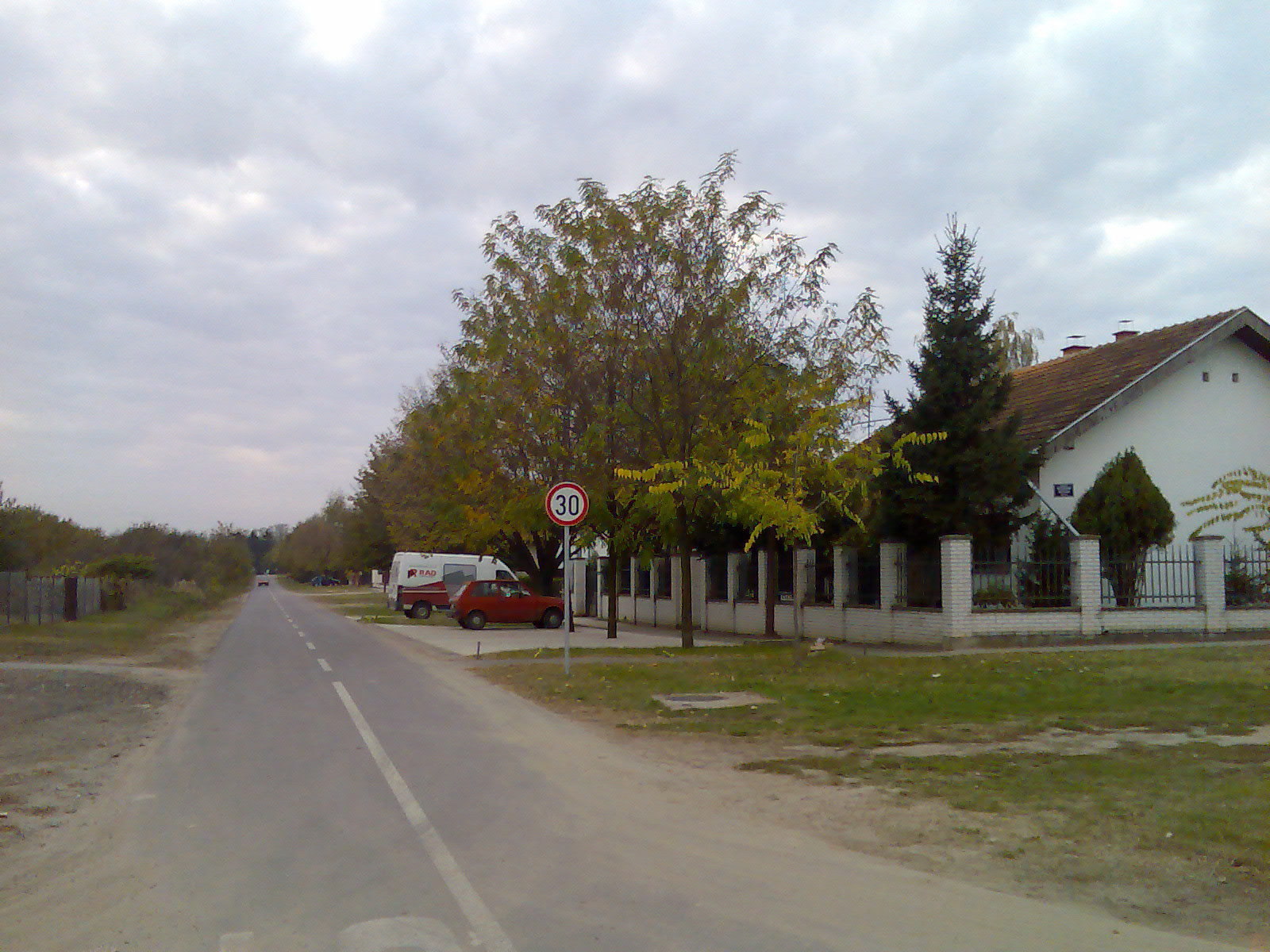 Radanovac Vocarska ulica Autor: Josip FLEIS, Izvor: Sopstvena fotografija